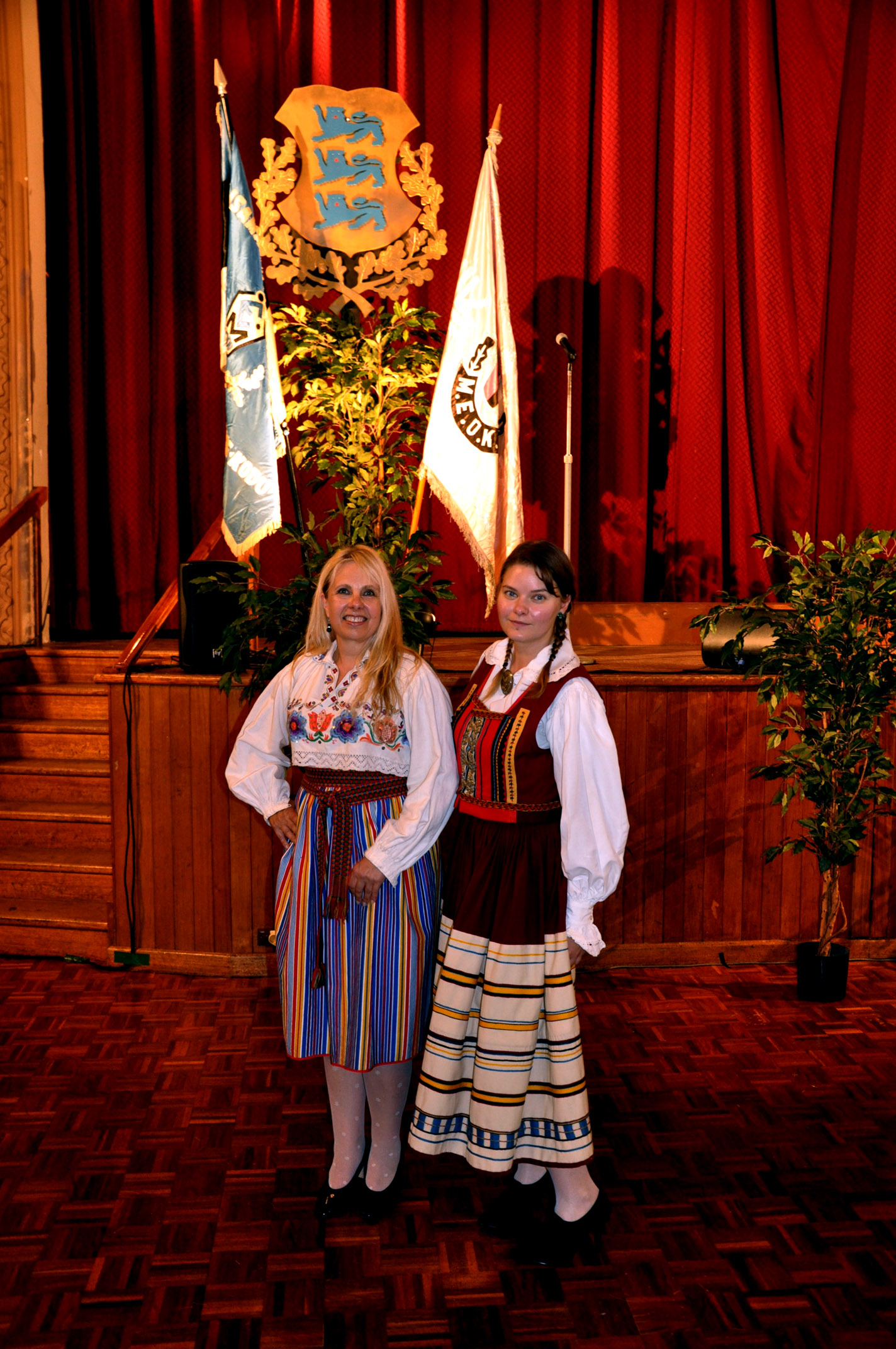 Melbourne'i Eesti Maja, Vabariigi aastapäev 2012. aastal.